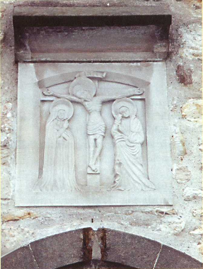 Weihetafel an Kirche in Rethen (Vordorf)